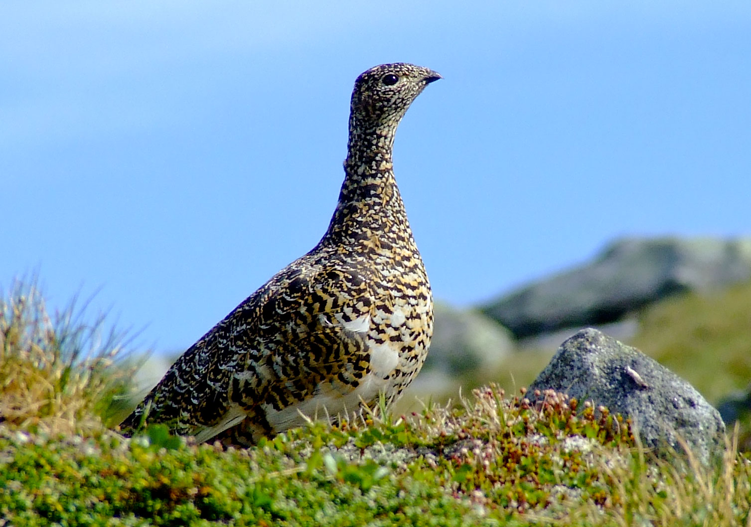 Moorschneehuhn im Padjelanta-Nationalpark, Nordschweden